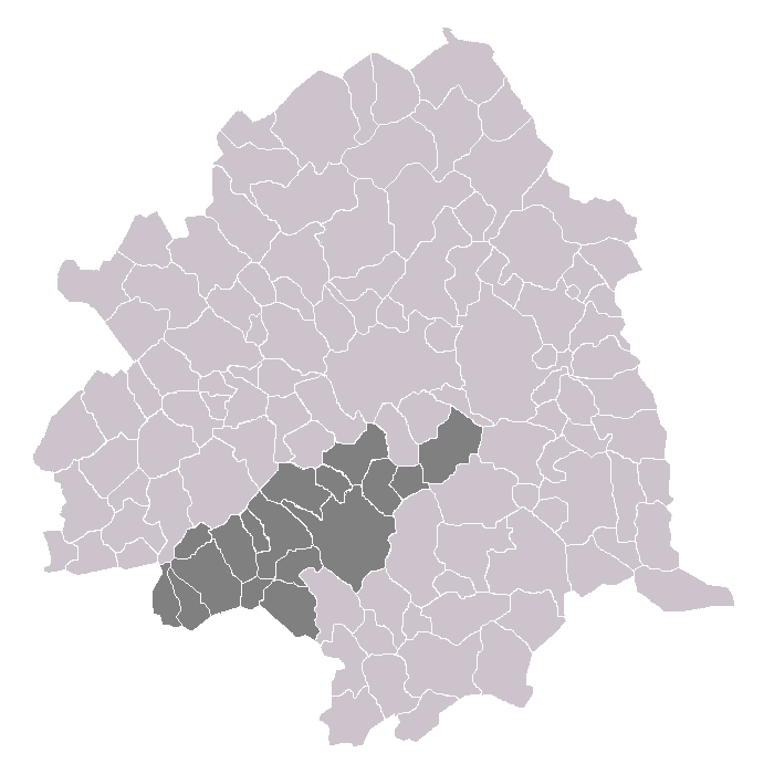 Les cantons de Seclin